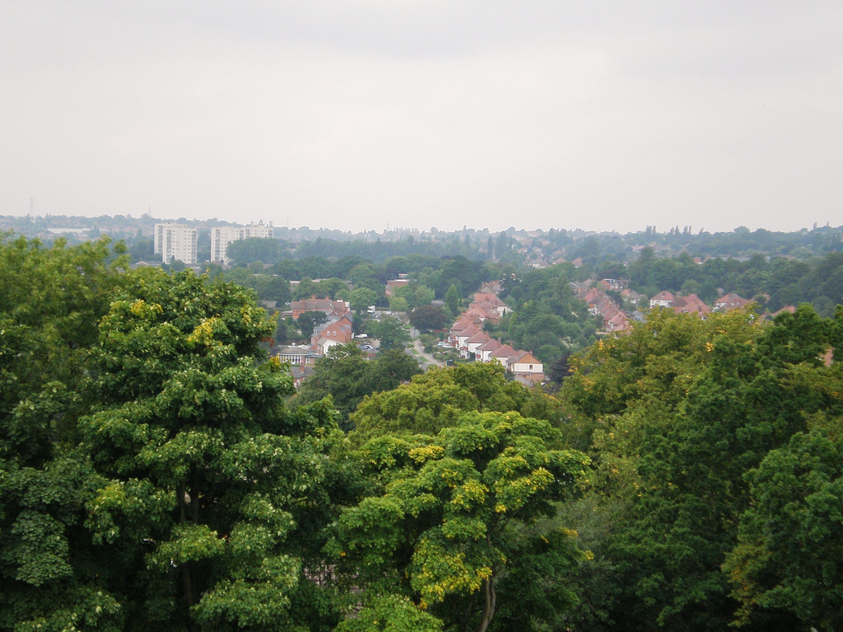 Edgbaston, Birmingham